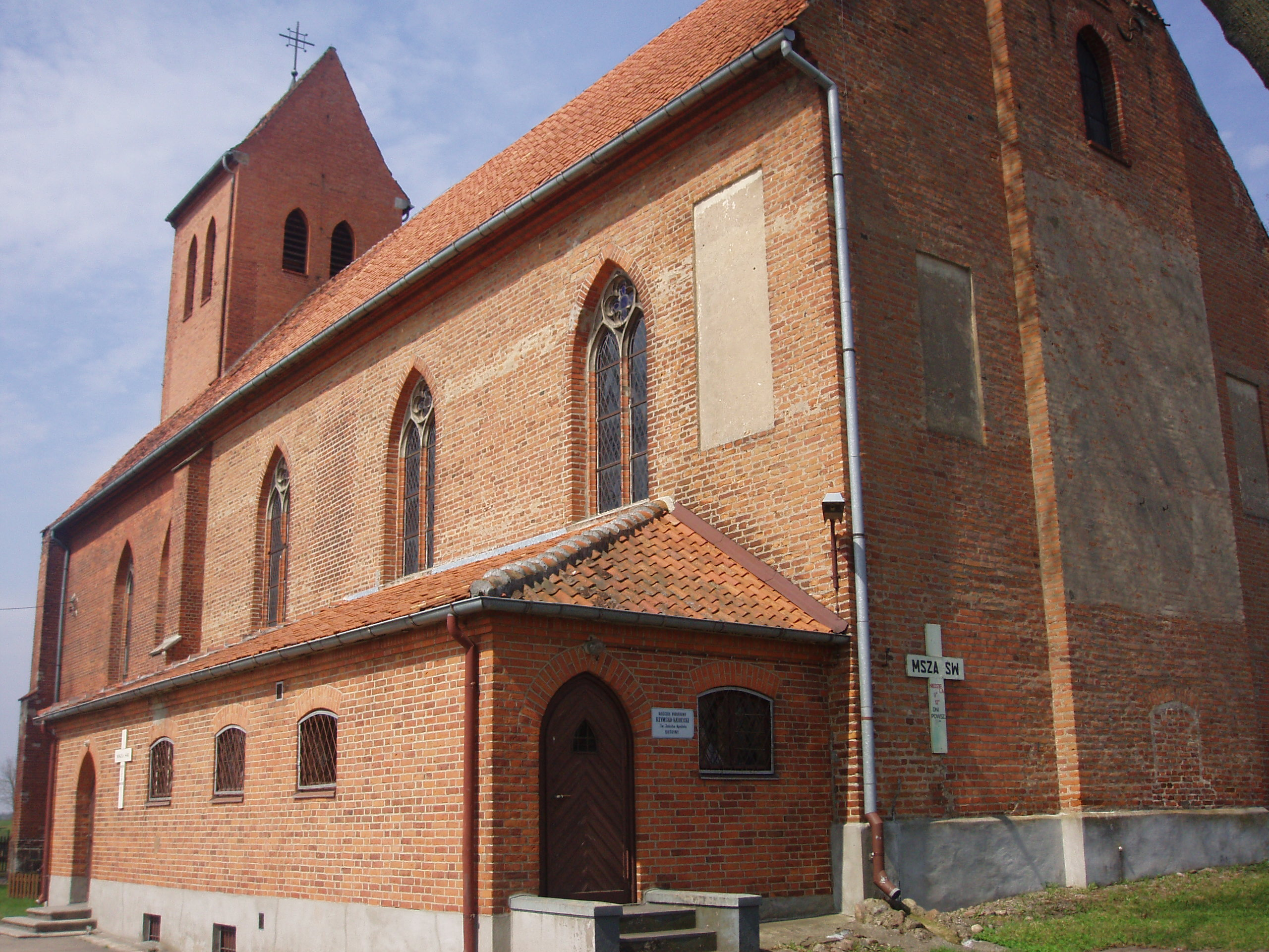 Butryny 22 - rzymskokatolicki kościół parafialmny p.w. św. Jakuba Apostoła, 1689, 1887-1889